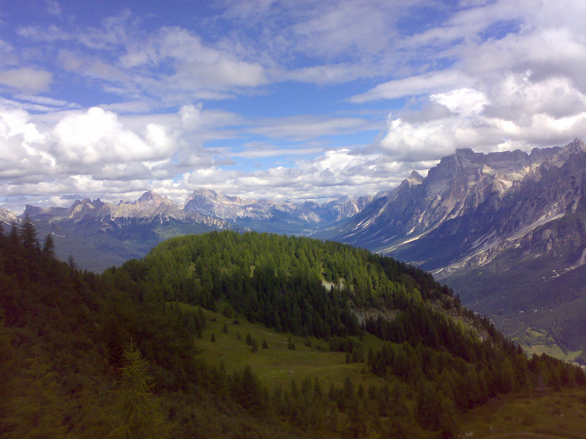 La Val Boite dal Monte Rite